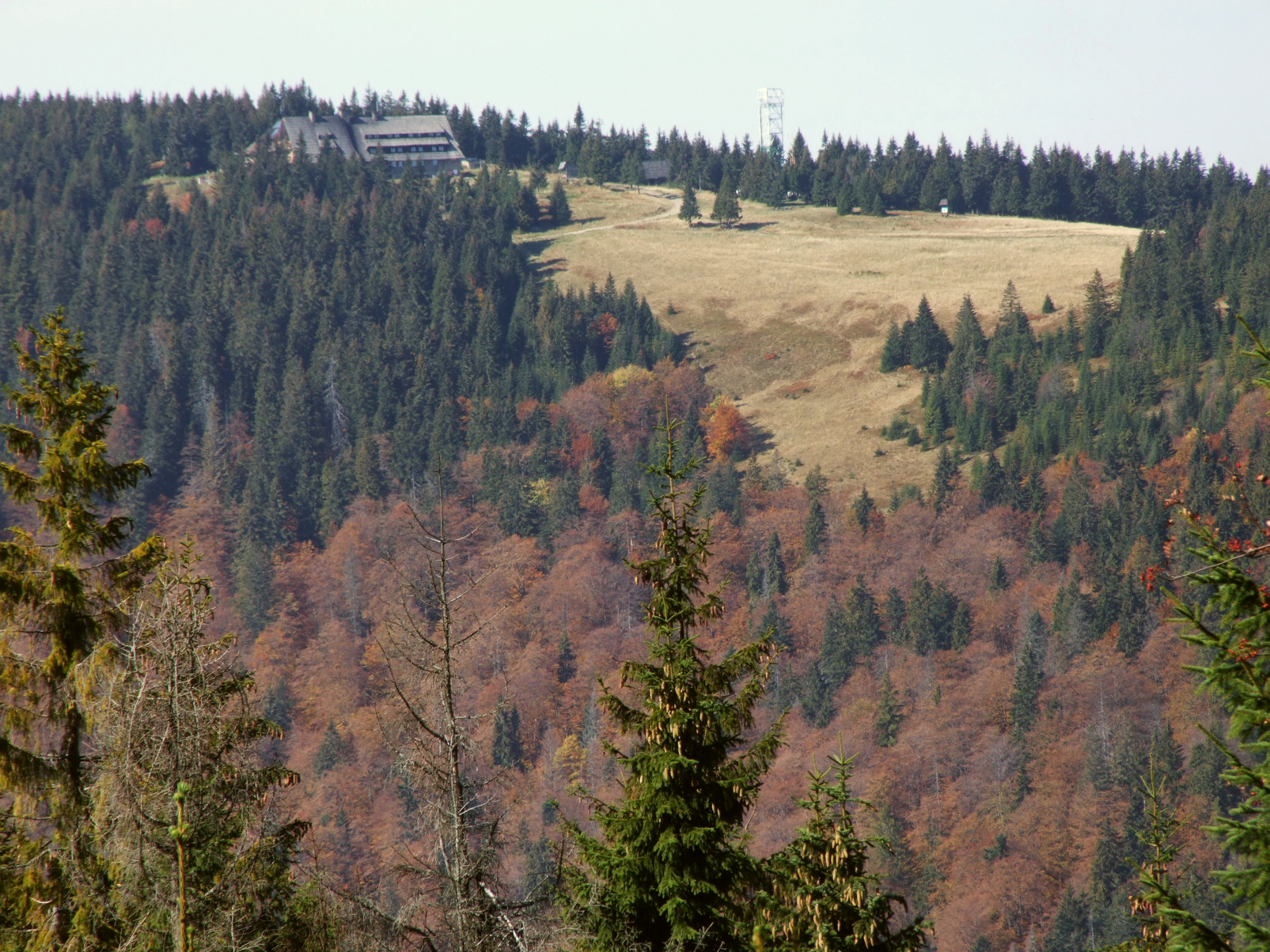 Turbacz (Gorce)